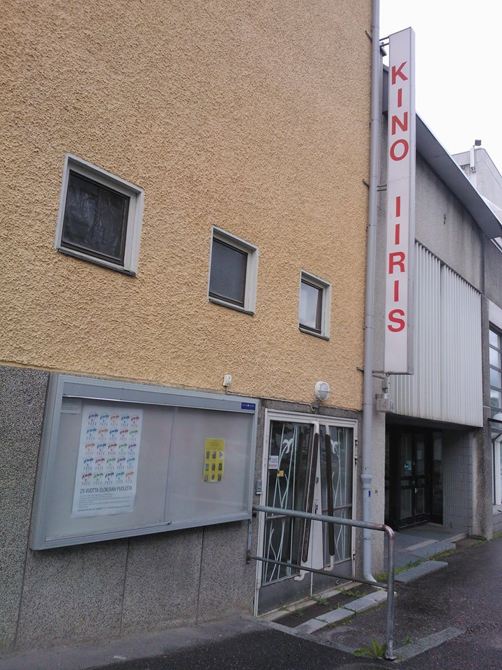 Elokuvateatteri Kino Iiriksen sisäänkäynti